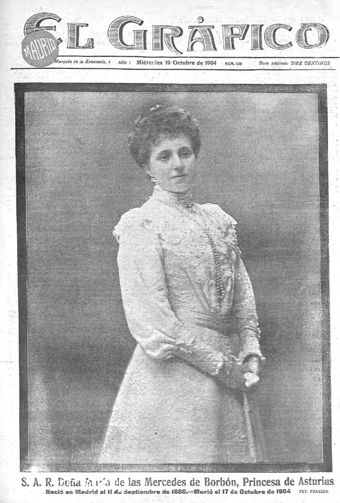 Portada de la publicación El Gráfico, con la infanta María de las Mercedes; fotografía de Franzen